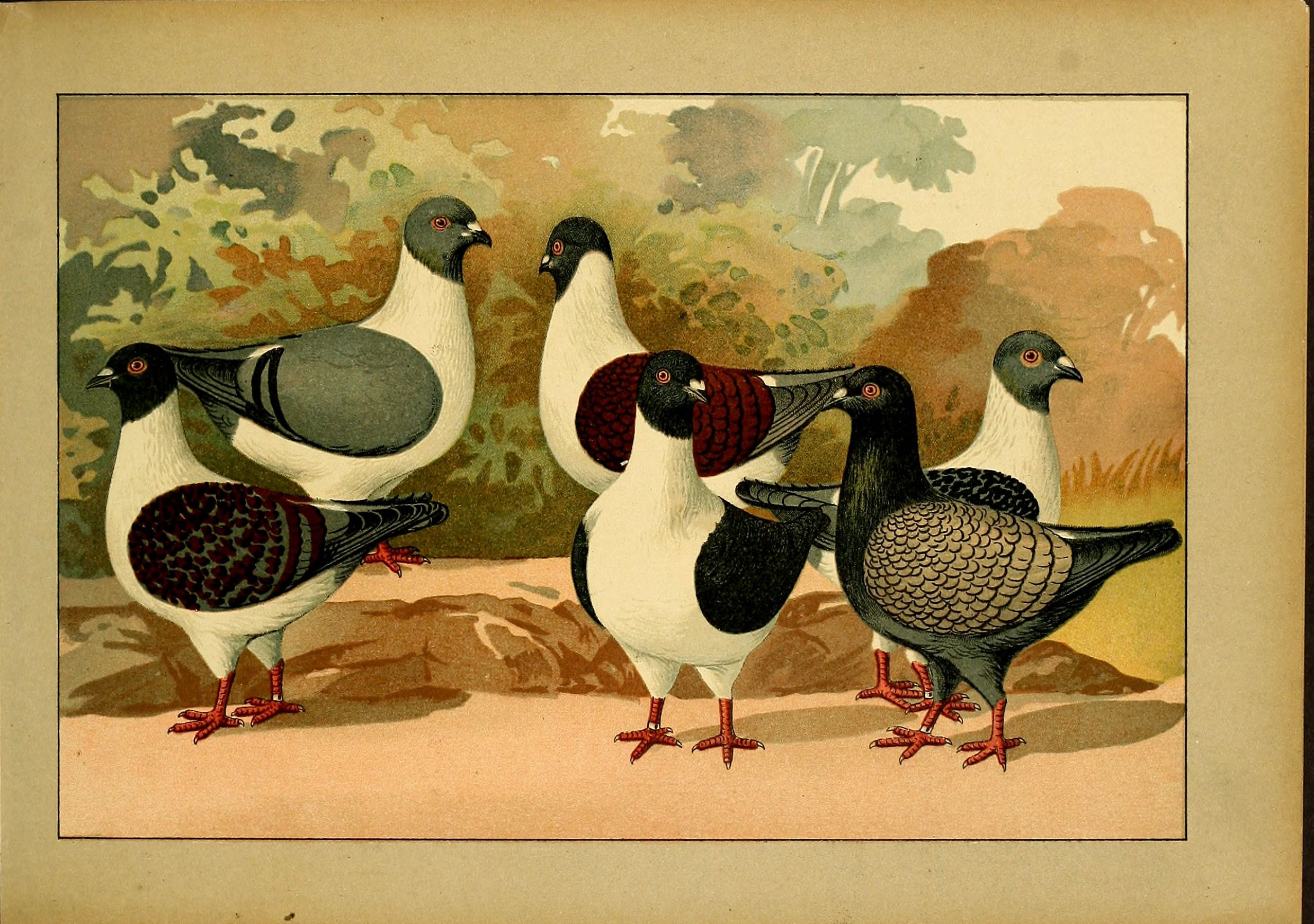 Deutsch